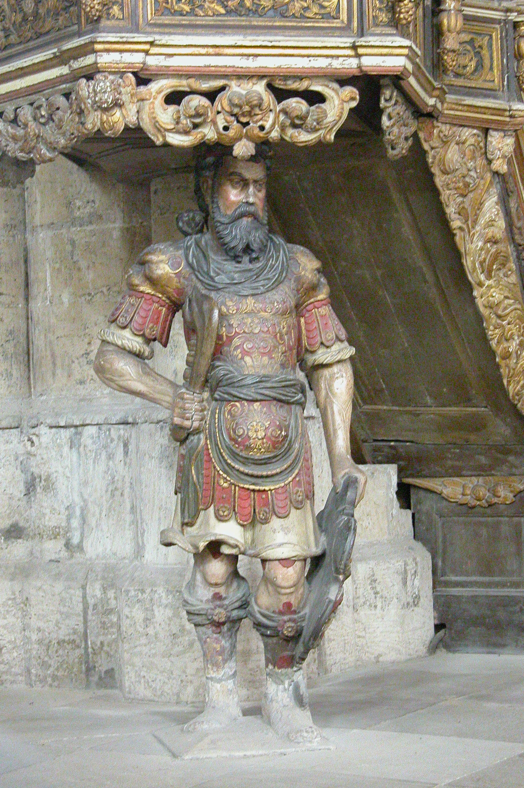 Samson at St. Martin Halberstadt